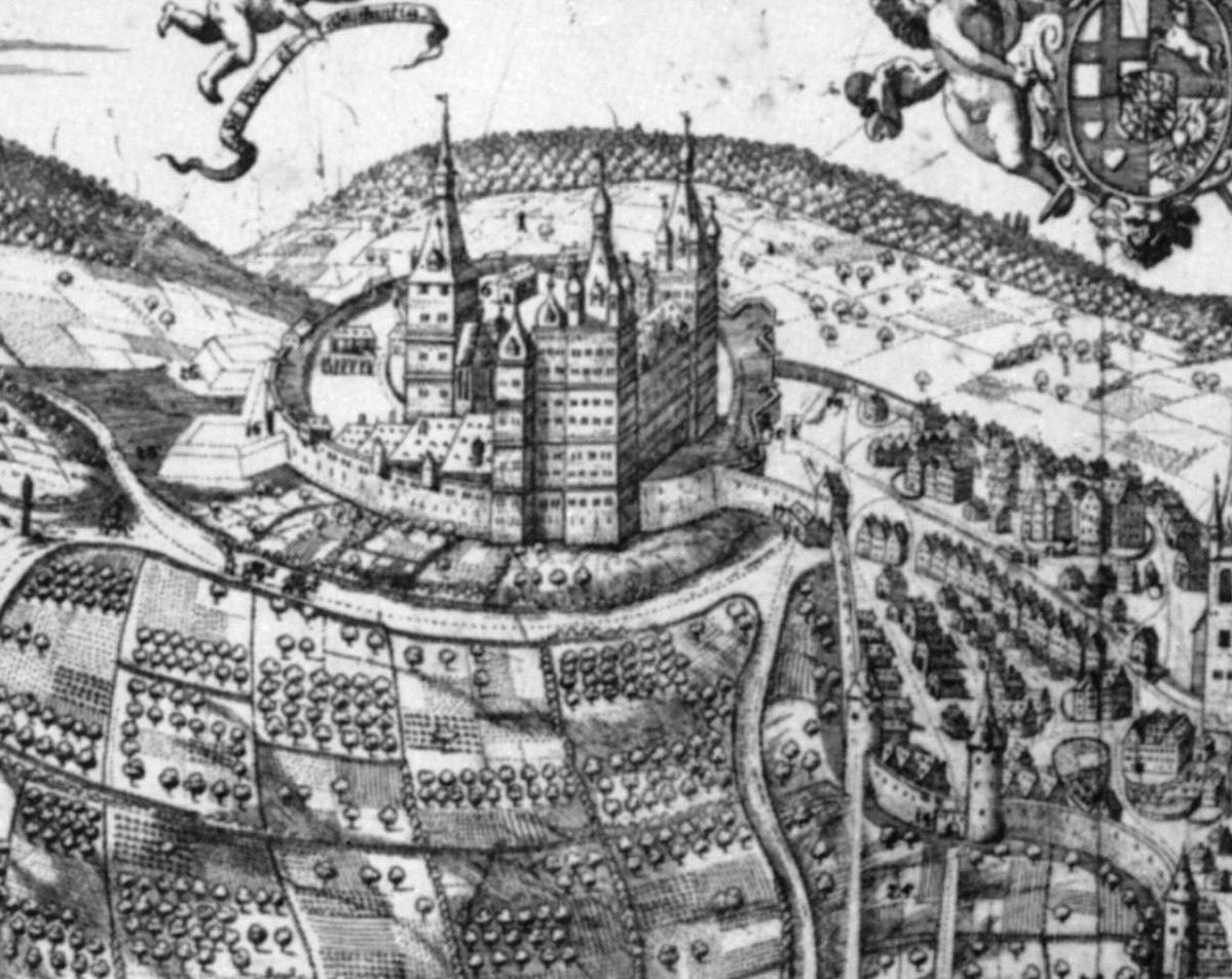 Schloss Arnsberg (Max-Heinrich-Bau)